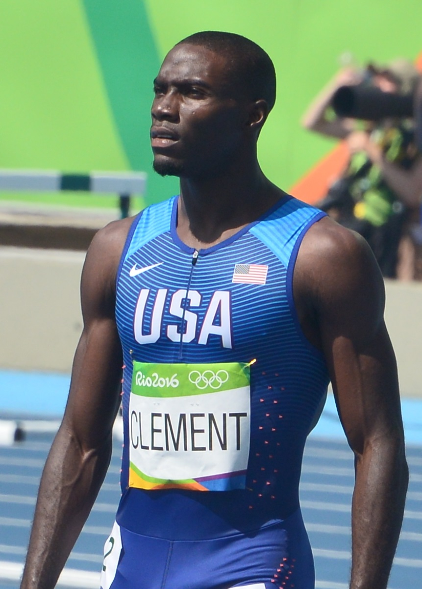 Kerron Clement à Rio lors des séries du 400m haies.